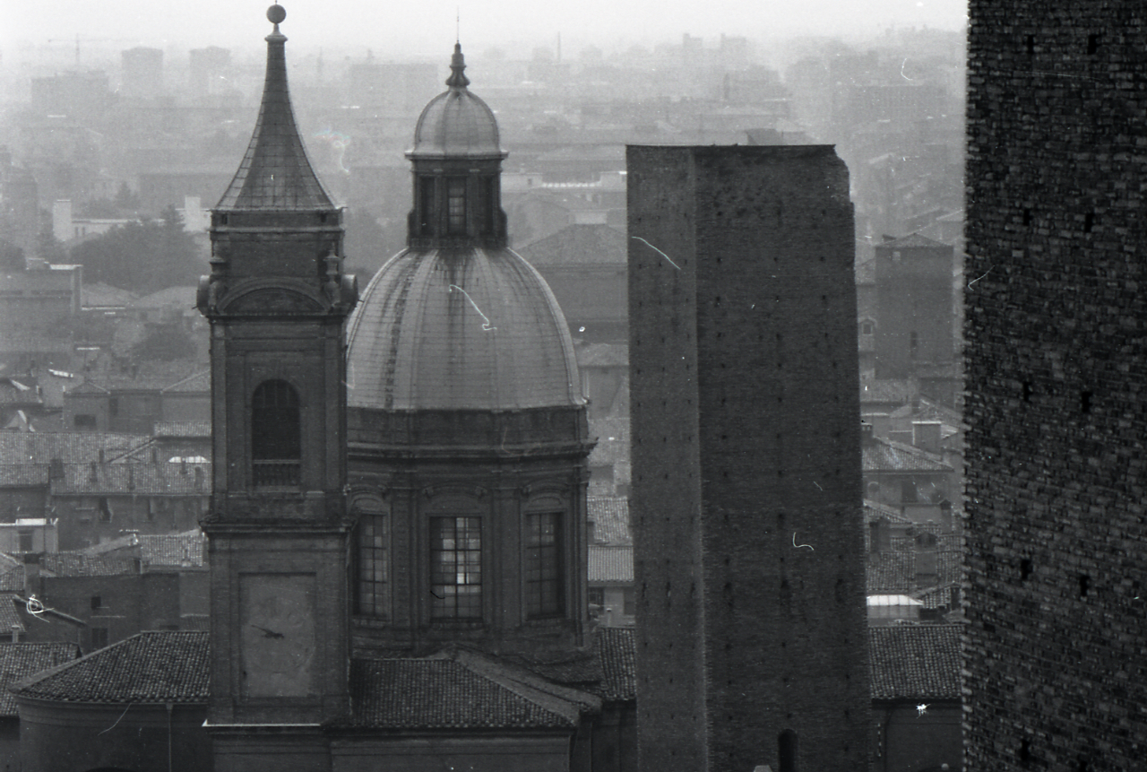 Servizio fotografico : Bologna, 1969 / Paolo Monti. - Strisce: 7, Fotogrammi complessivi: 38 : Negativo b/n, gelatina bromuro d'argento/ pellicola ; 35 mm. - ((I fotogrammi hanno una doppia numerazione. . - Sul portanegativi: Nikon Agfa 21. - Occasione: Campagna di rilevamento del centro storico del comune di Bologna. - Fonte: Fattura di Paolo Monti: IV. Commesse/ Fattura (1969/05/09), presso Archivio Paolo Monti. - Fonte: Fattura di Paolo Monti: IV. Commesse/ Fattura (1969/07/31), presso Archivio Paolo Monti. - Fonte: Agenda di Paolo Monti: Monti - Agenda 1969 (1969), presso Archivio Paolo Monti